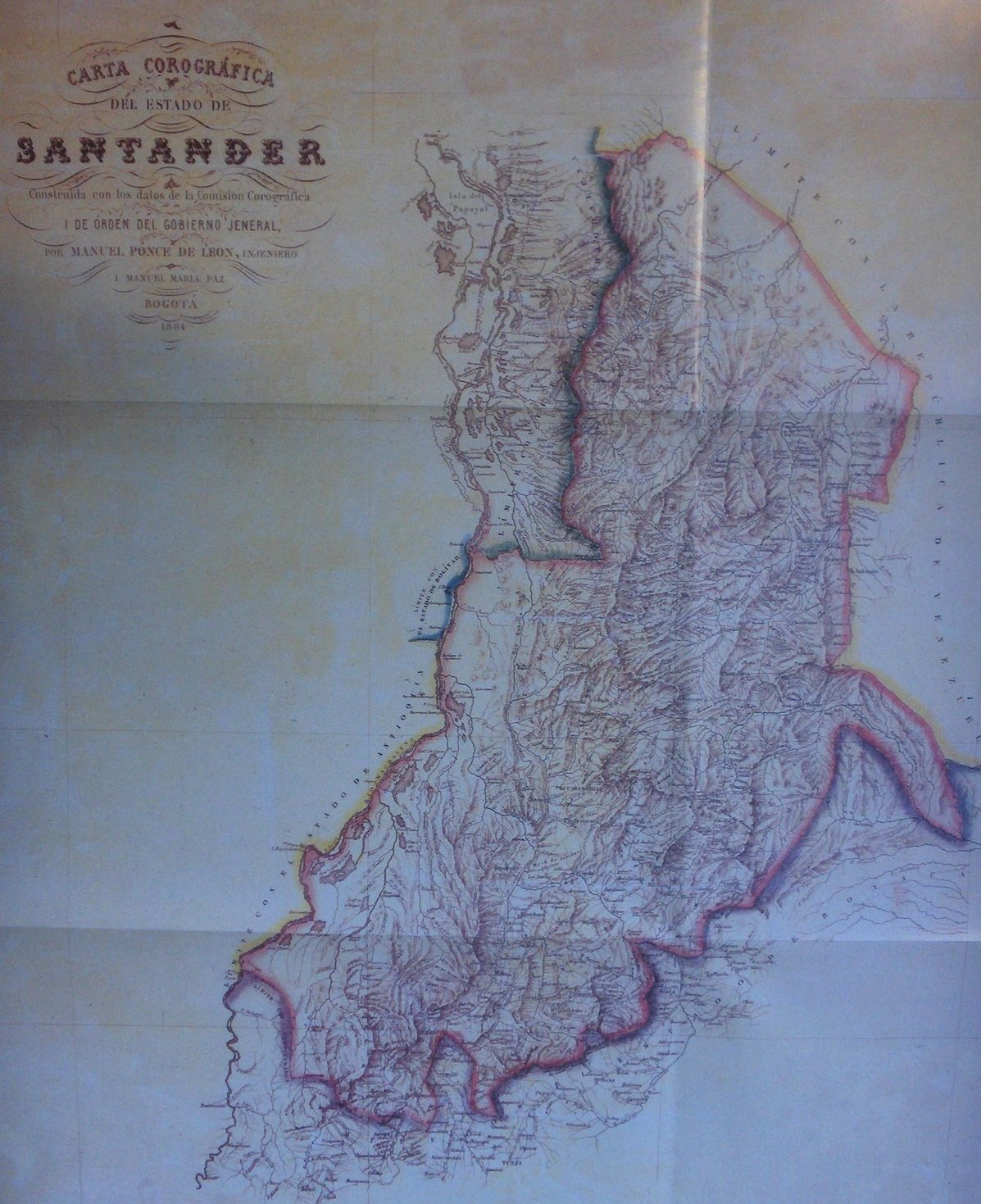 Carta Corográfica del Estado Soberano de Santander. Tomado del "Atlas de los Estados Unidos de Colombia, antigua Nueva Granada", 1865.